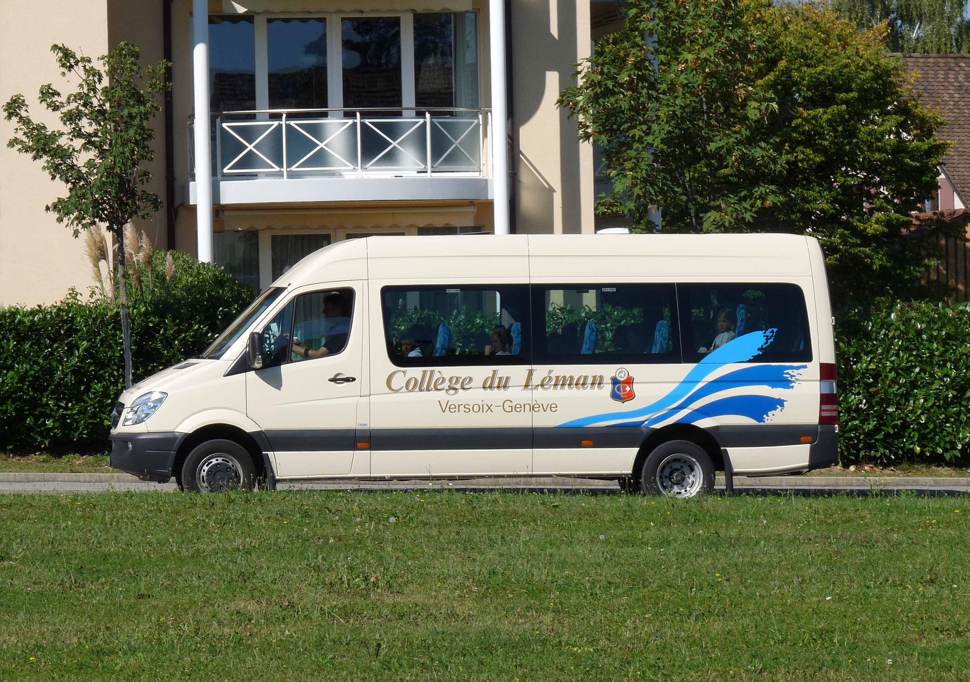 Minibus du Collège privé du Léman assurant le ramassage des élèves, près de Versoix